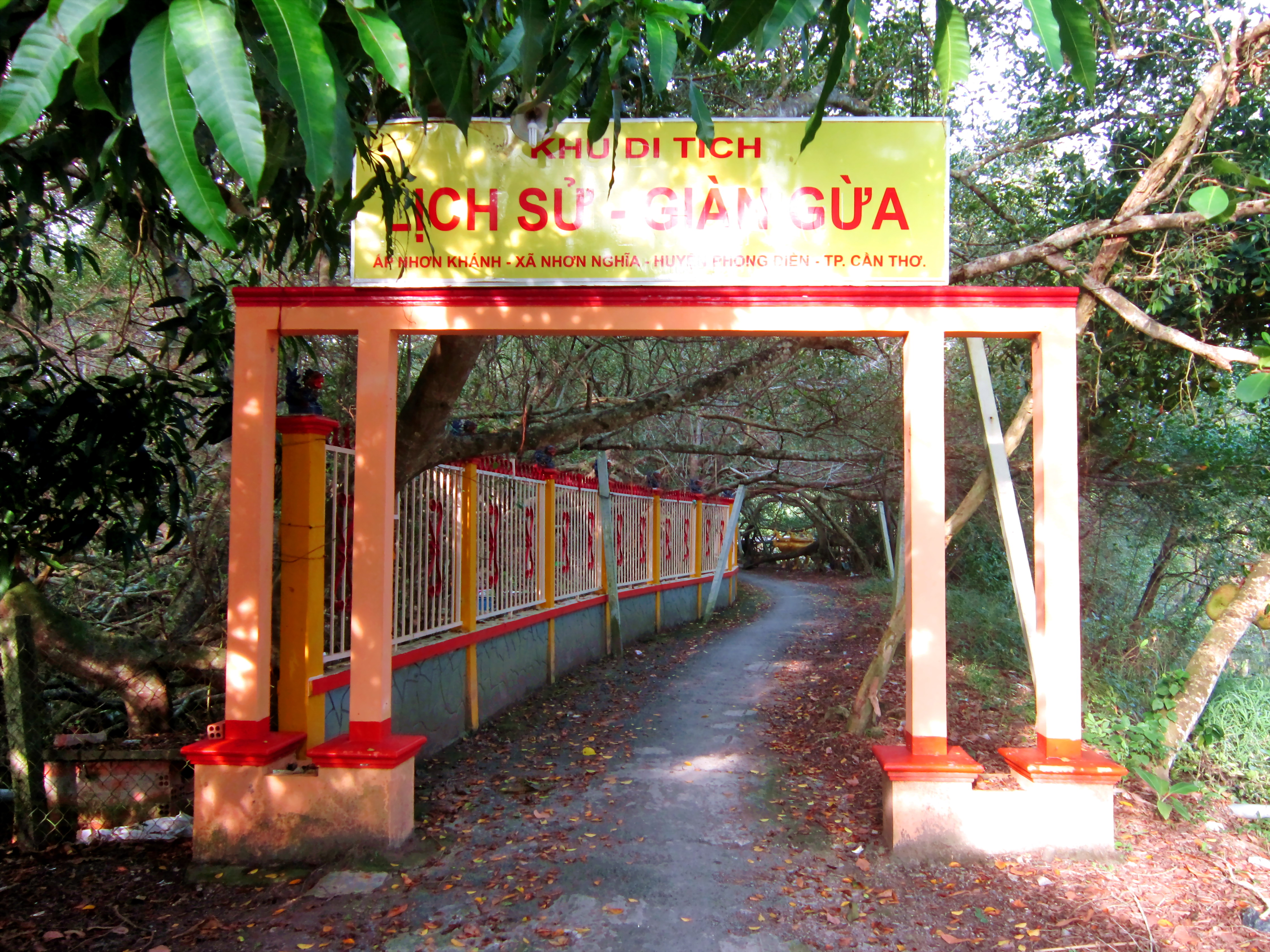 Cổng vào Khu di tích lịch sử Giàn Gừa ở Phong Điền, Cần Thơ, Việt Nam.